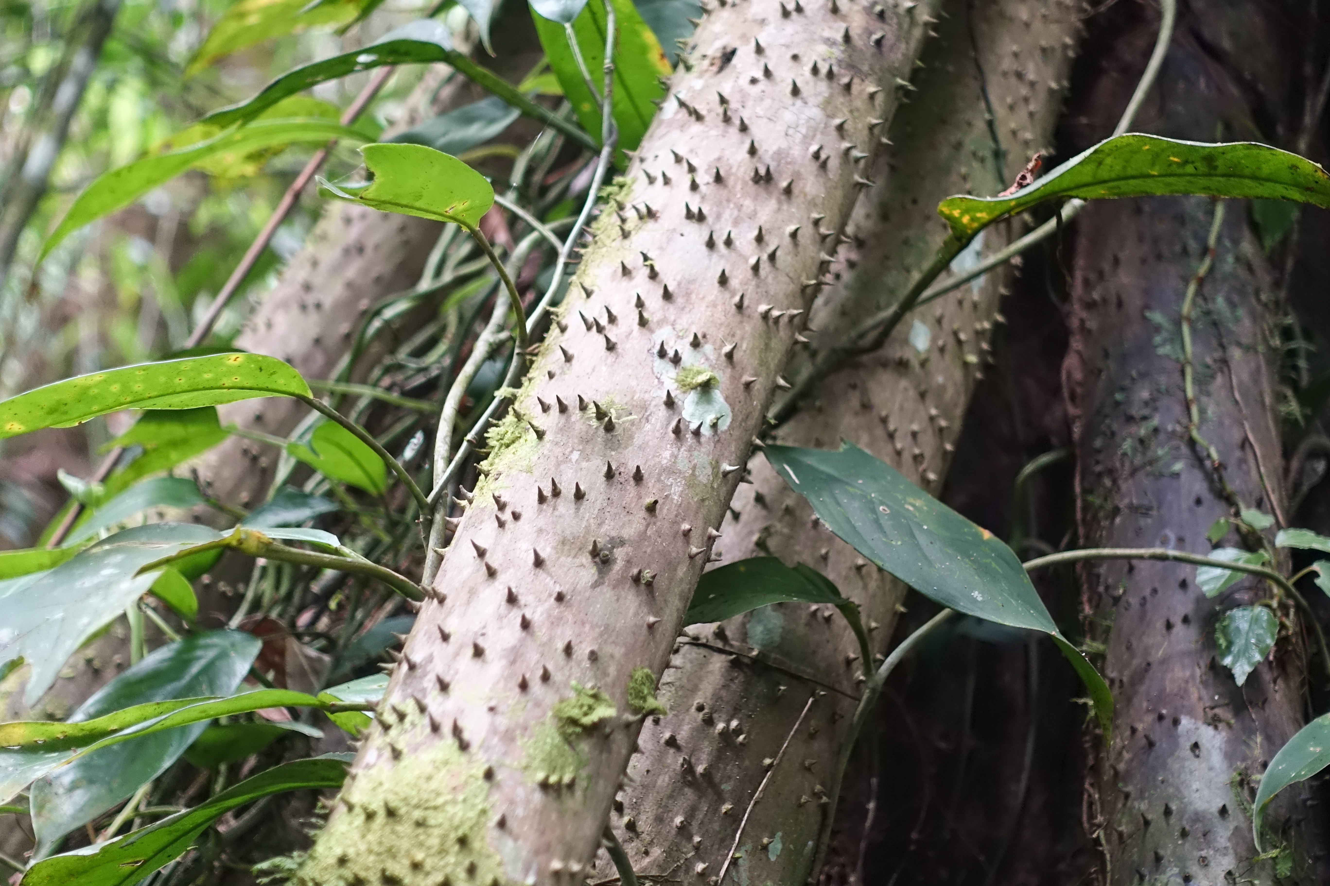 Bestachelte Stelzwurzeln einer Palme, Cuyabeno Wildtier-Reservat, Ecuador